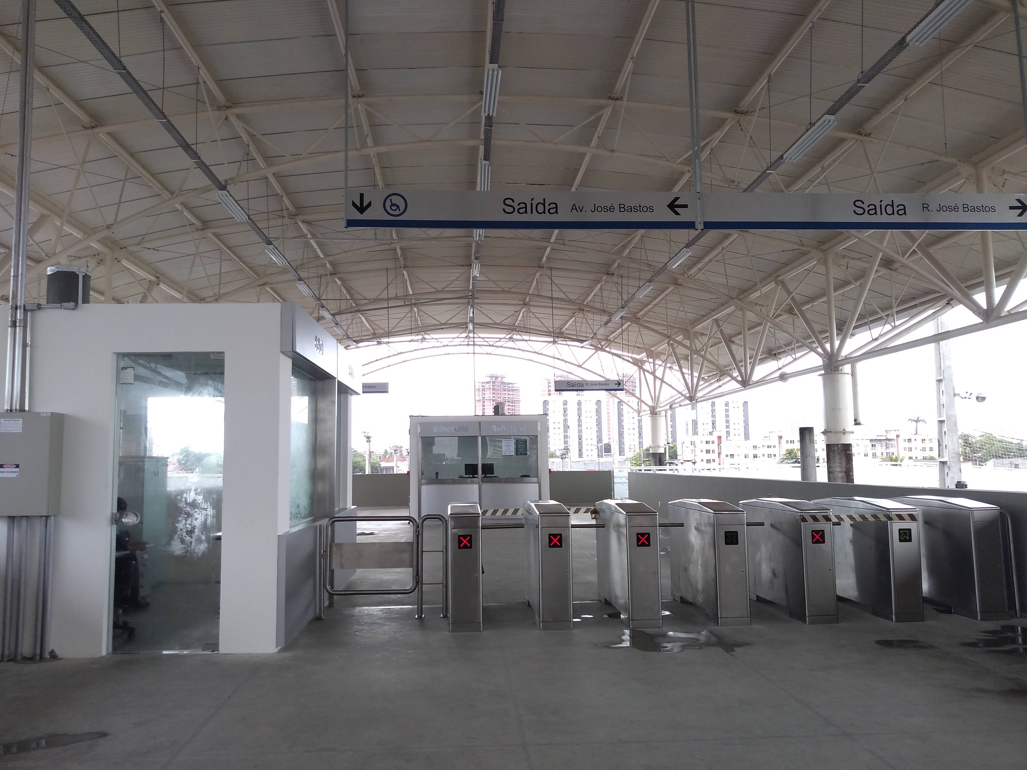 Bloqueios, passarela e CCO da Estação Padre Cícero, ultima estação a ser entregue da Linha Sul do Metrô de Fortaleza em Dezembro de 2019.